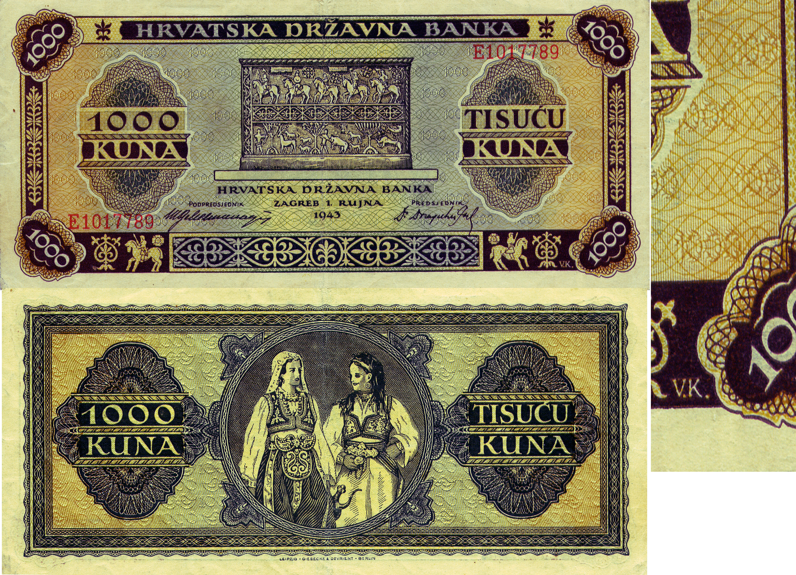 1000 kuna 1. rujna 1943. koje je dizajnirao Vladimir Kirin